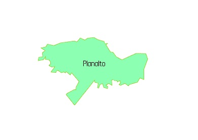 Representação Gráfica de Planalto-RS